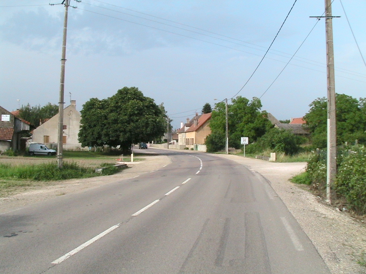 Entrée du village Photo prise par Bertrand GRONDIN